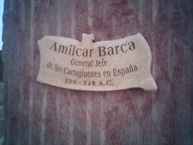 Detalle del monolito conmemorativo de la muerte de Amílcar Barca en Elche de la Sierra (Albacete, España).